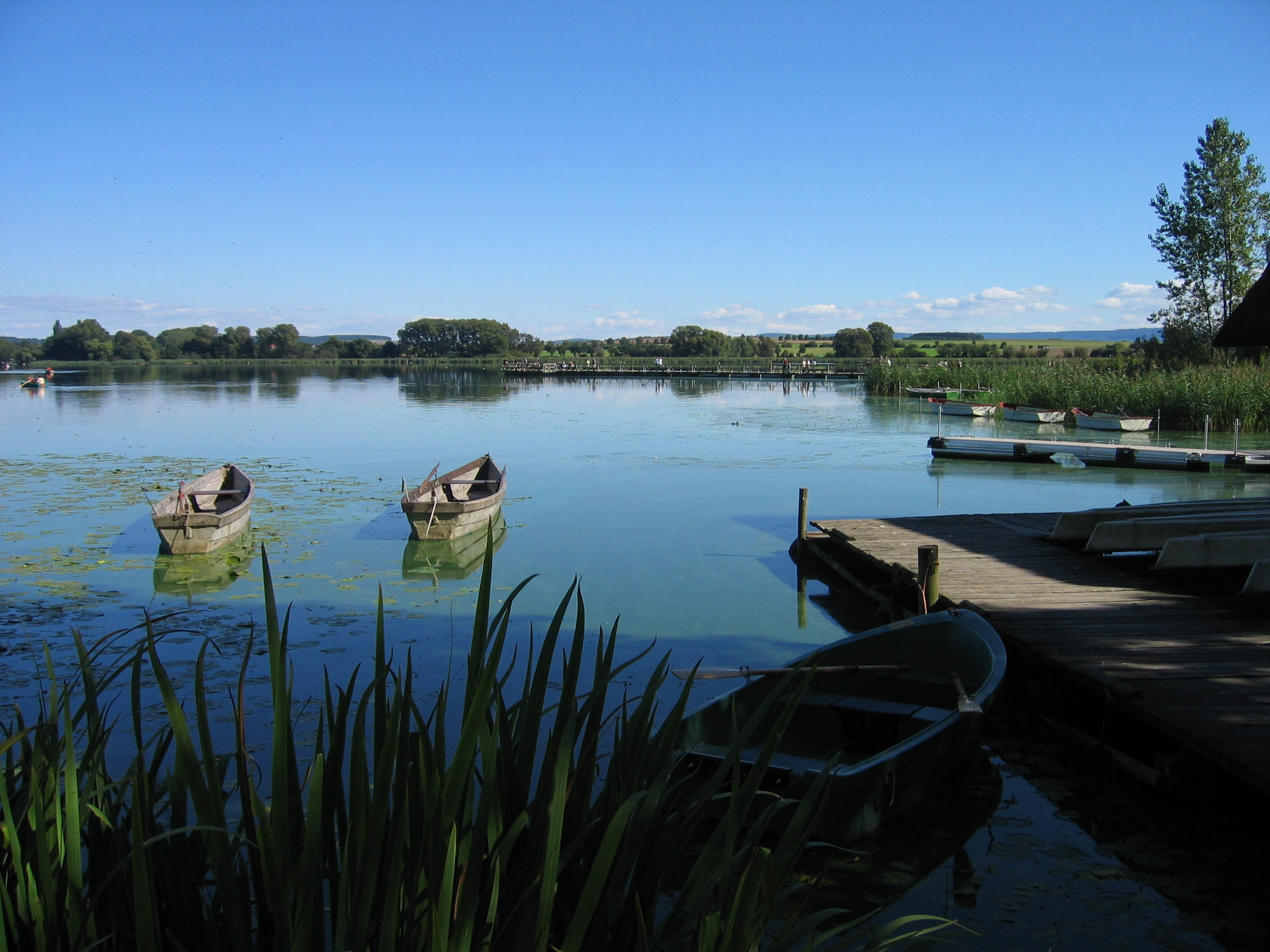 Blick über den südlichen Teil des Seeburger Sees (von Seeburg)